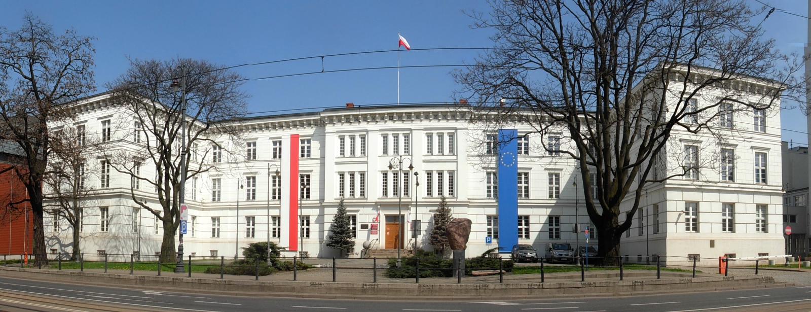 Budynek Kujawsko-Pomorskiego Urzędu Wojewódzkiego, Bydgoszcz Jagiellońska 3, 1834-36, Carl Adler, Friedrich Obuch, Karl Friedrich Schinkl. Rozbudowa 1863-64, 1898-1900 i 1965